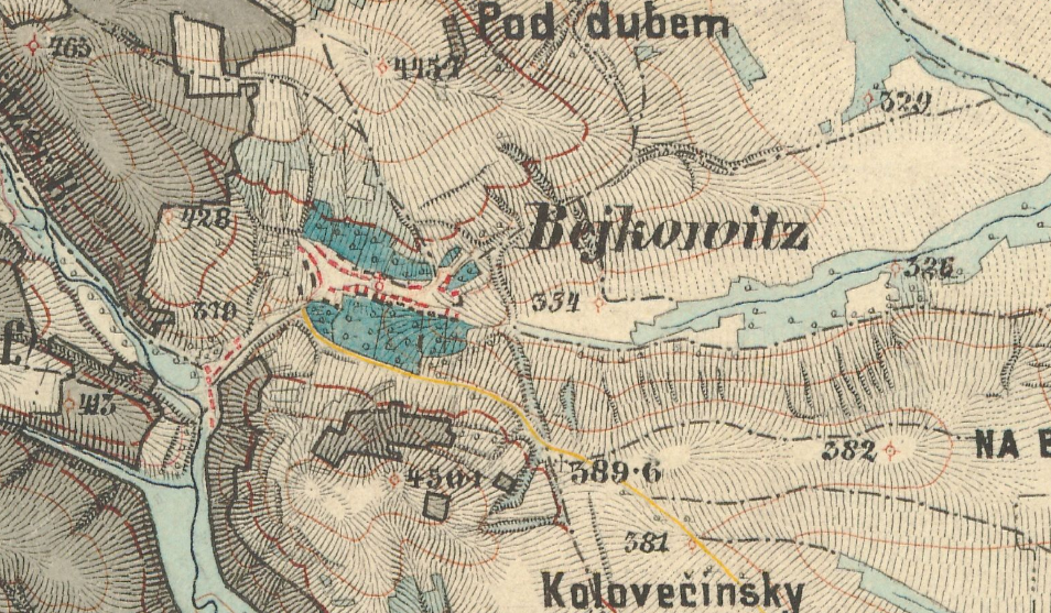 Morava, III. vojenské mapování 1876